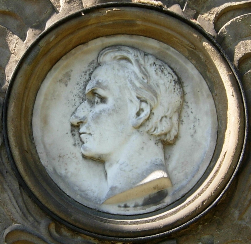 Tondo von Hermann Heidel am Grabstein des Schriftstellers Philipp Joseph Rehfues, auf dem Alten Friedhof Bonn